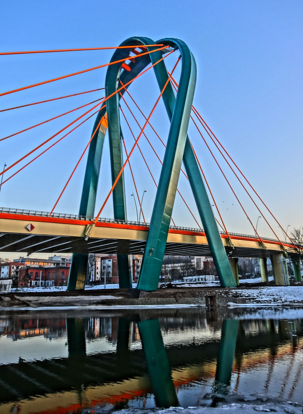 Pylon Trasy Uniwersyteckiej w Bydgoszczy